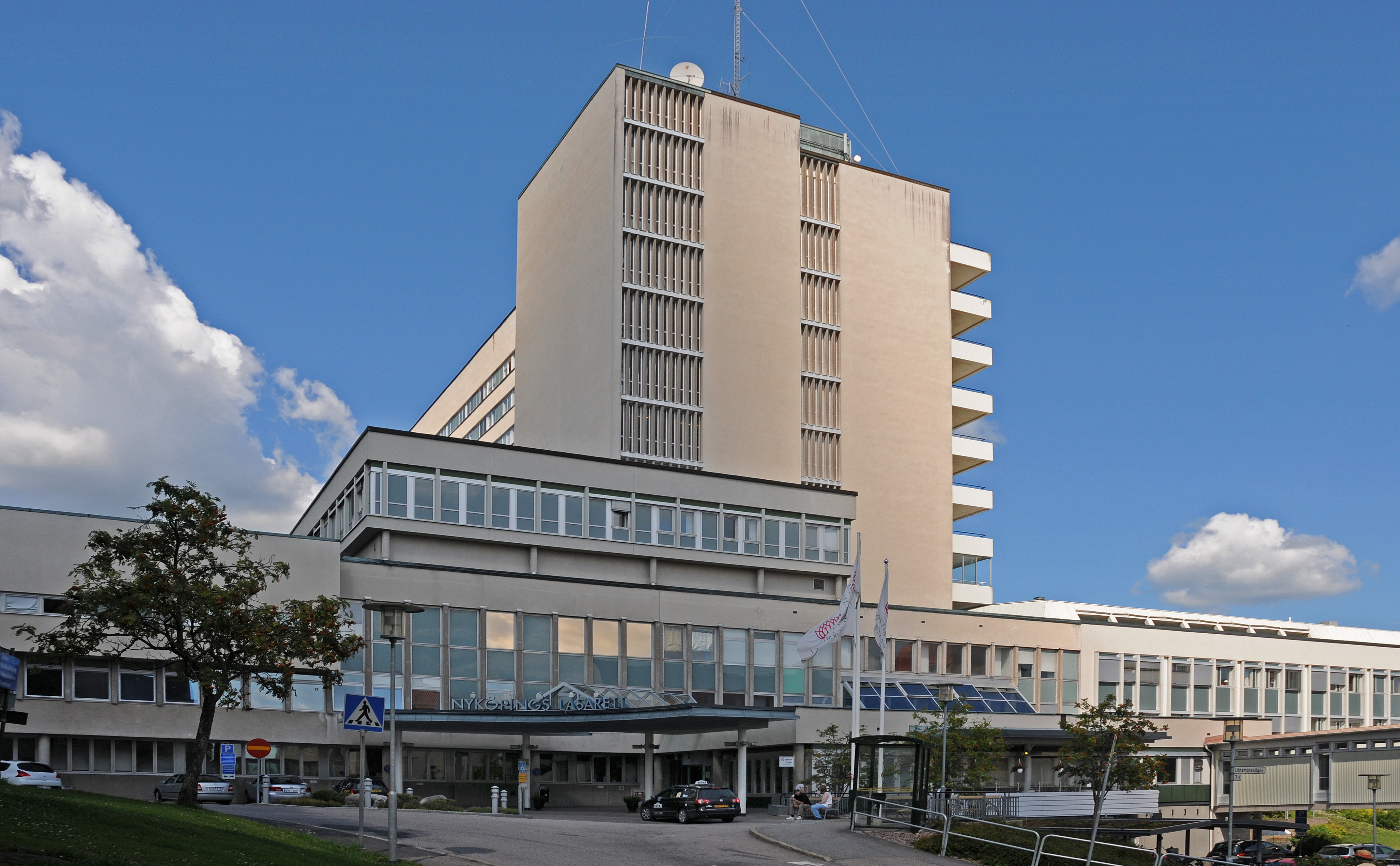 Sjukhuset i Nyköping